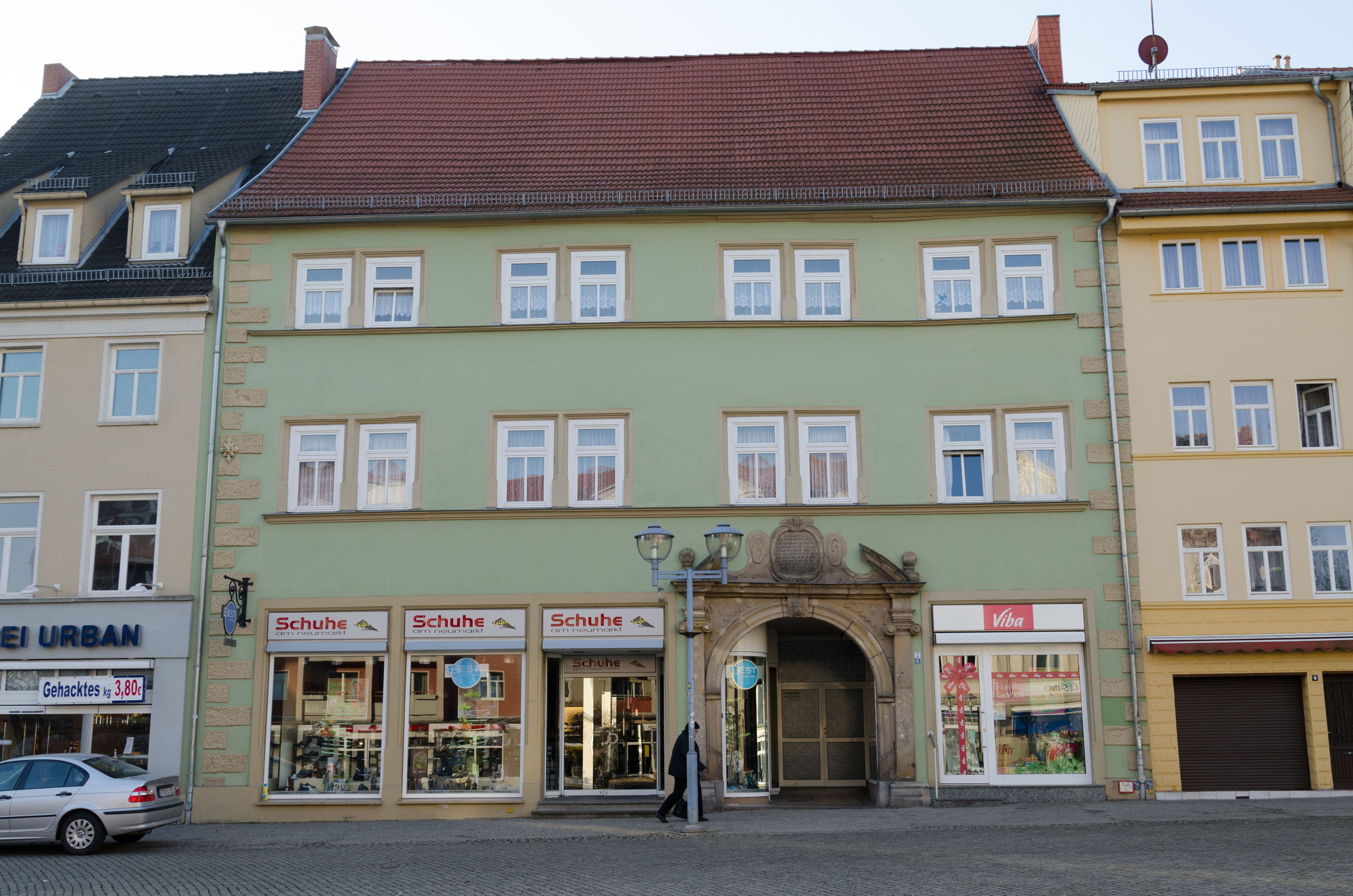 Gotha, Neumarkt 6